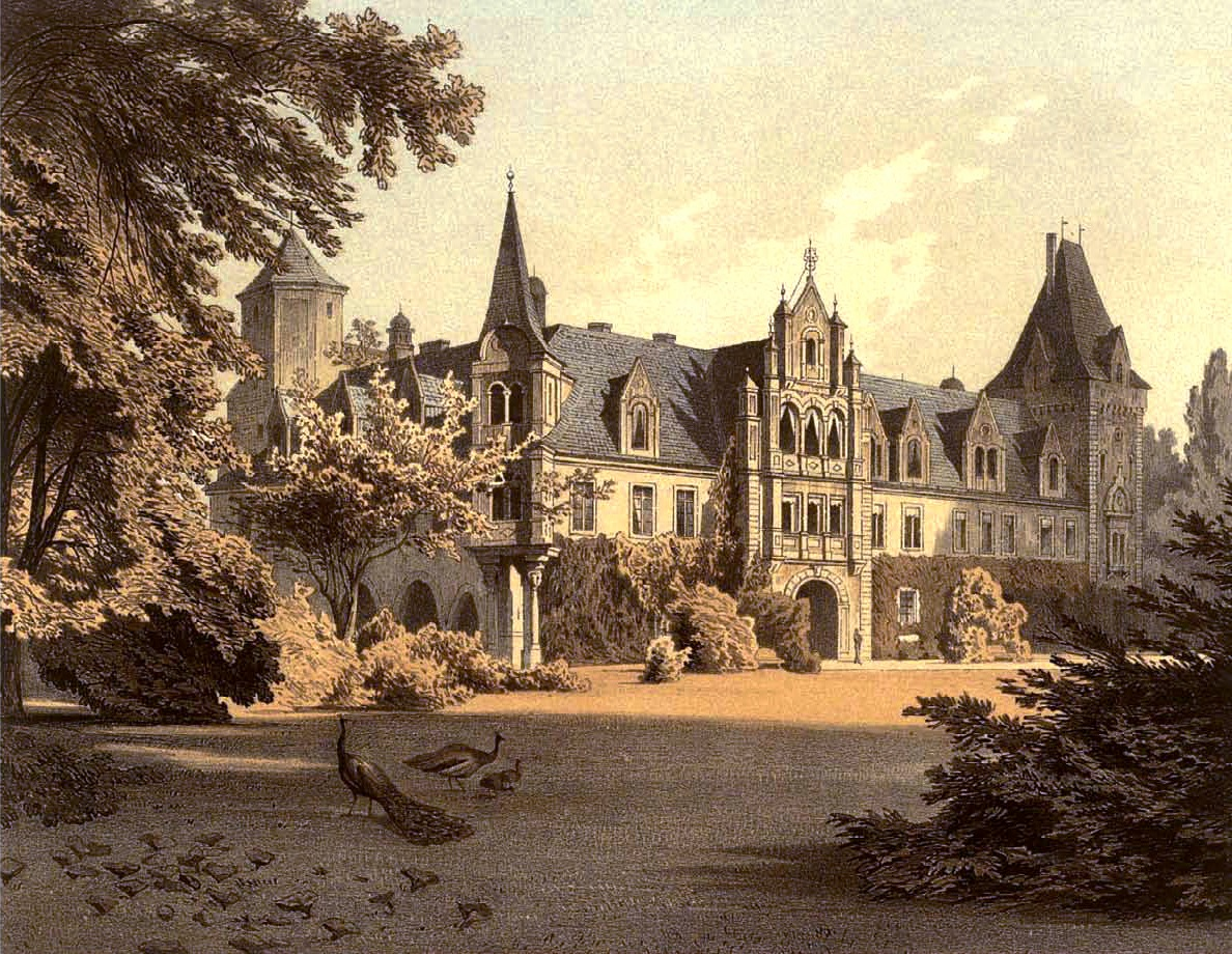 Rittergut Ullersdorf, Kreis Rothenburg, Provinz Schlesien